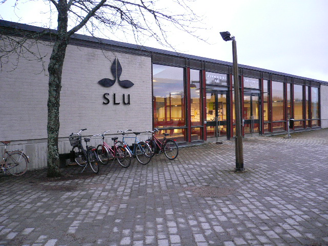 Sveriges lantbruksuniversitet, undervisningshuset